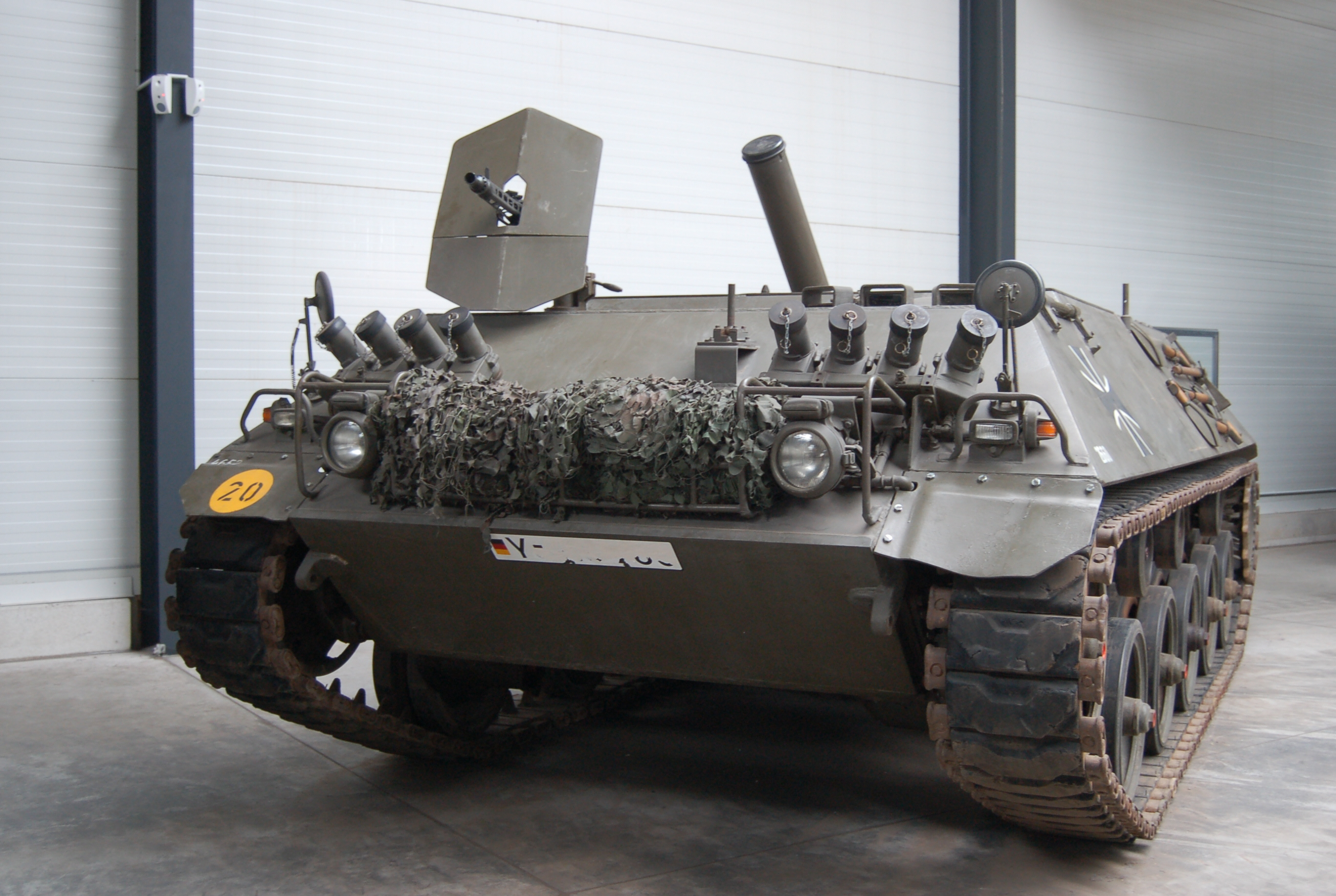 Schützenpanzer (lang) HS 30 „Panzermörser 120 mm Brandt (F)“ im Deutschen Panzermuseum Munster Besatzung: 5 Soldaten Gewicht: 15,3 Tonnen Motorleistung: 168 kW (229 PS) Bewaffnung: 1 Mörser 120 mm von Brandt (F), und 1 MG 7,62 mm mit Schildblende Baujahr: 1966 Stückzahl: 150